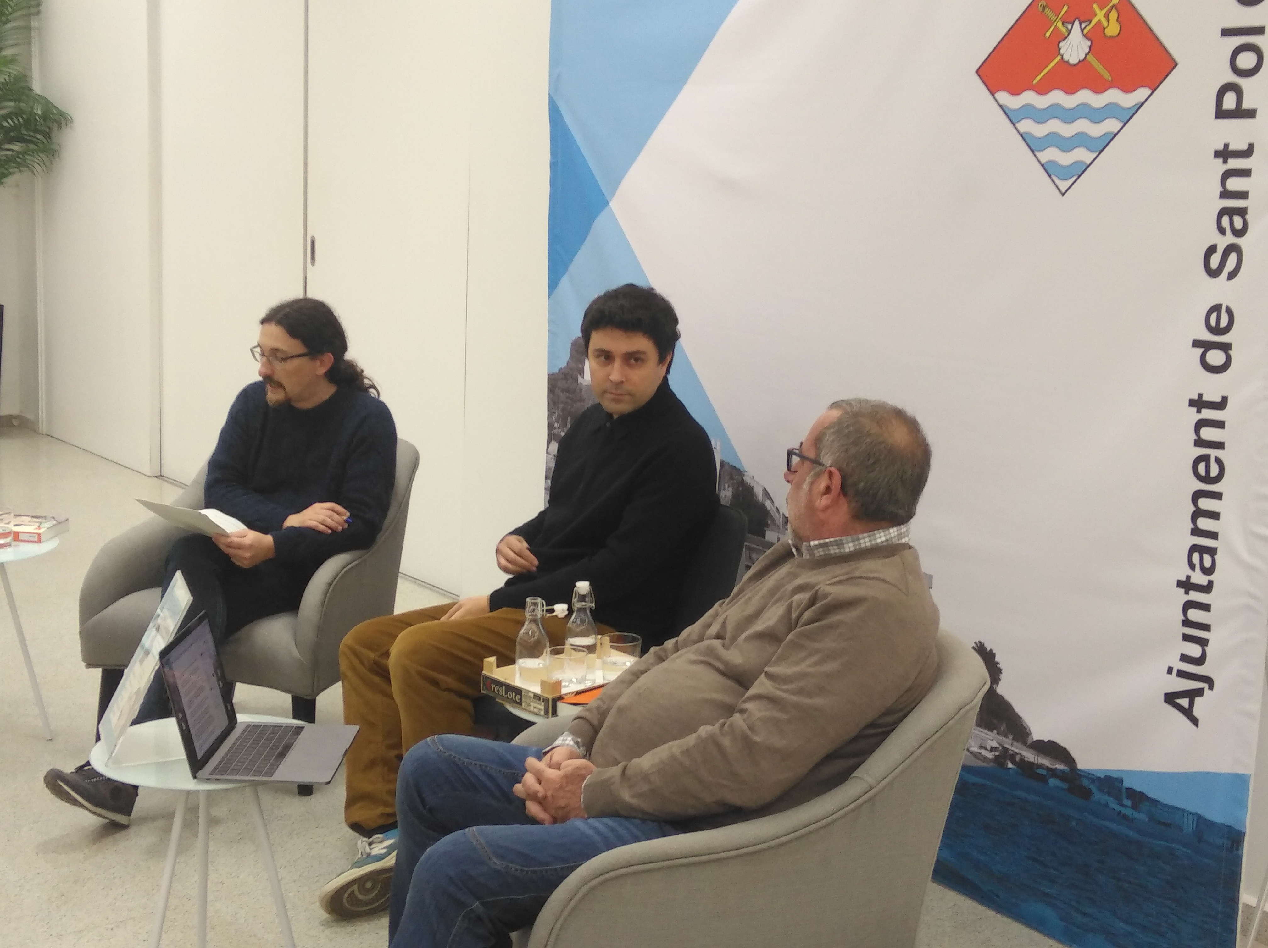 Jordi Nopca, Pere Tió i Jordi Sugrañes presentant el llibre "La teva ombra"